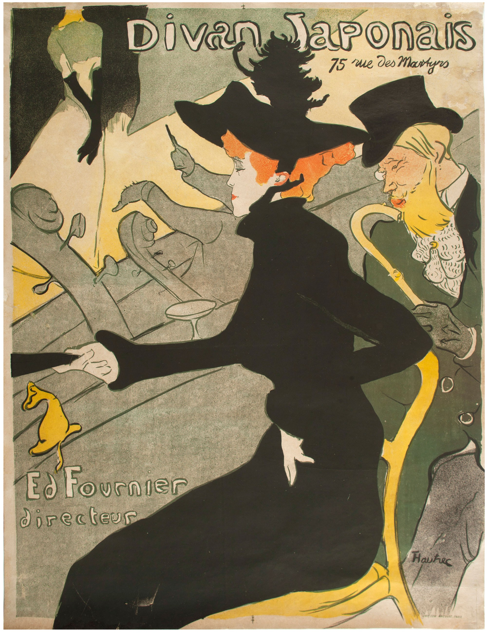 Henri de Toulouse-Lautrec, Divan Japonais. Siglo XIX. 80 x 61,5 cm, litografía coloreada sobre papel pegado sobre cartón. Inv. 9215.